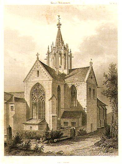 Kloster Bebenhausen, Klosterkirche (Abbildung aus Die Kunst des Mittelalters in Schwaben: Die Cisterzienser – Abtei im Schönbuch, 6. Lieferung, Stuttgart 1858, Tafel XVIII, Buch 25,0 × 32,5 cm)